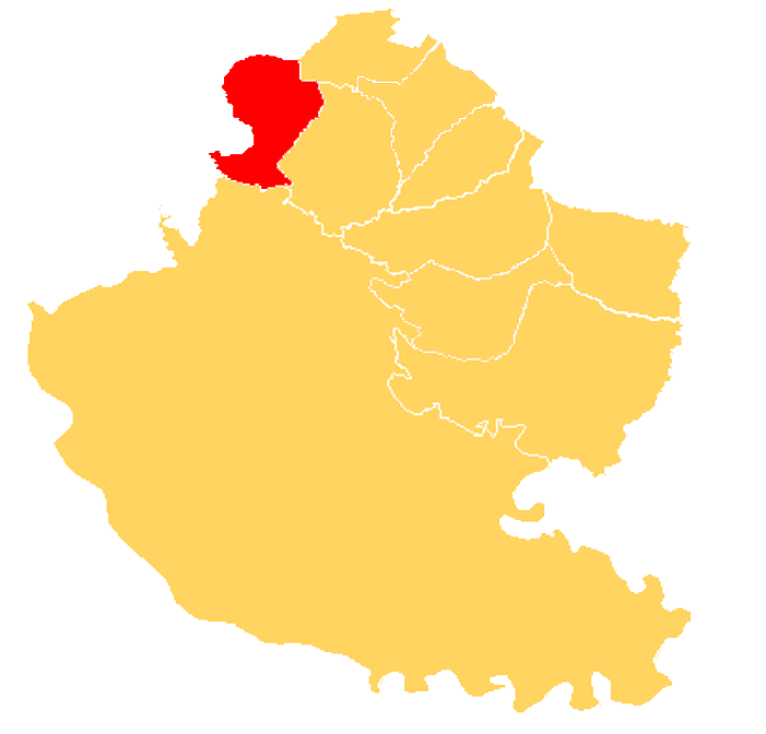 Rincón del Doll se encuentra en el Norte de la región Departamento Victoria. La región tiene el código postal 3101.